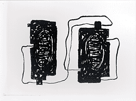 o.T. , Fettkreide auf Papier, 25 x 35 cm, 1986 ff